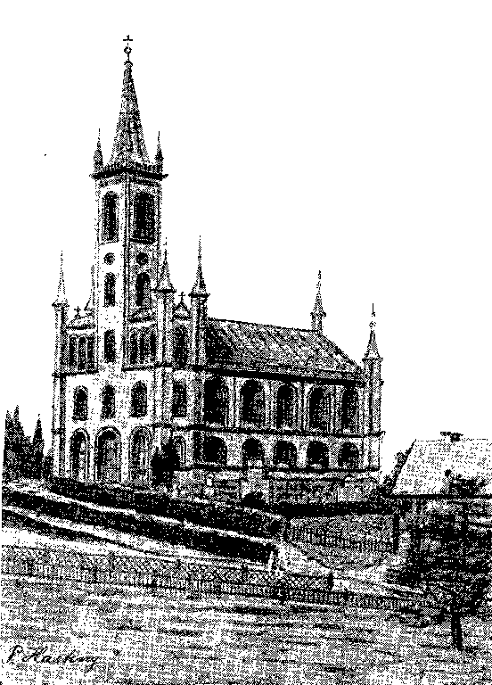 Die Matthäuskirche in Dittelsdorf, Zeichnung aus der Ortschronik